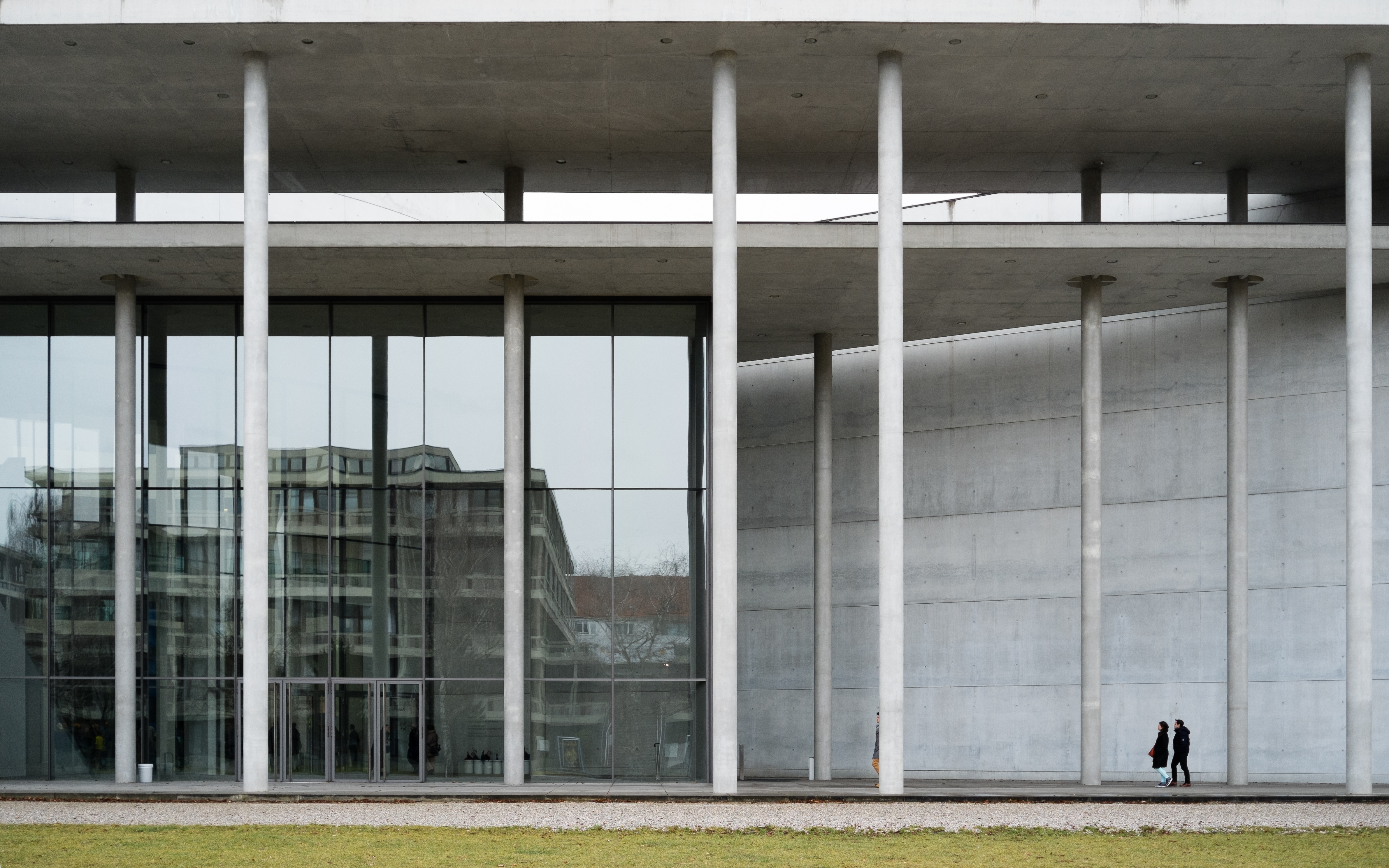 Pinakothek der Moderne in München, Eingang frontal gesehen